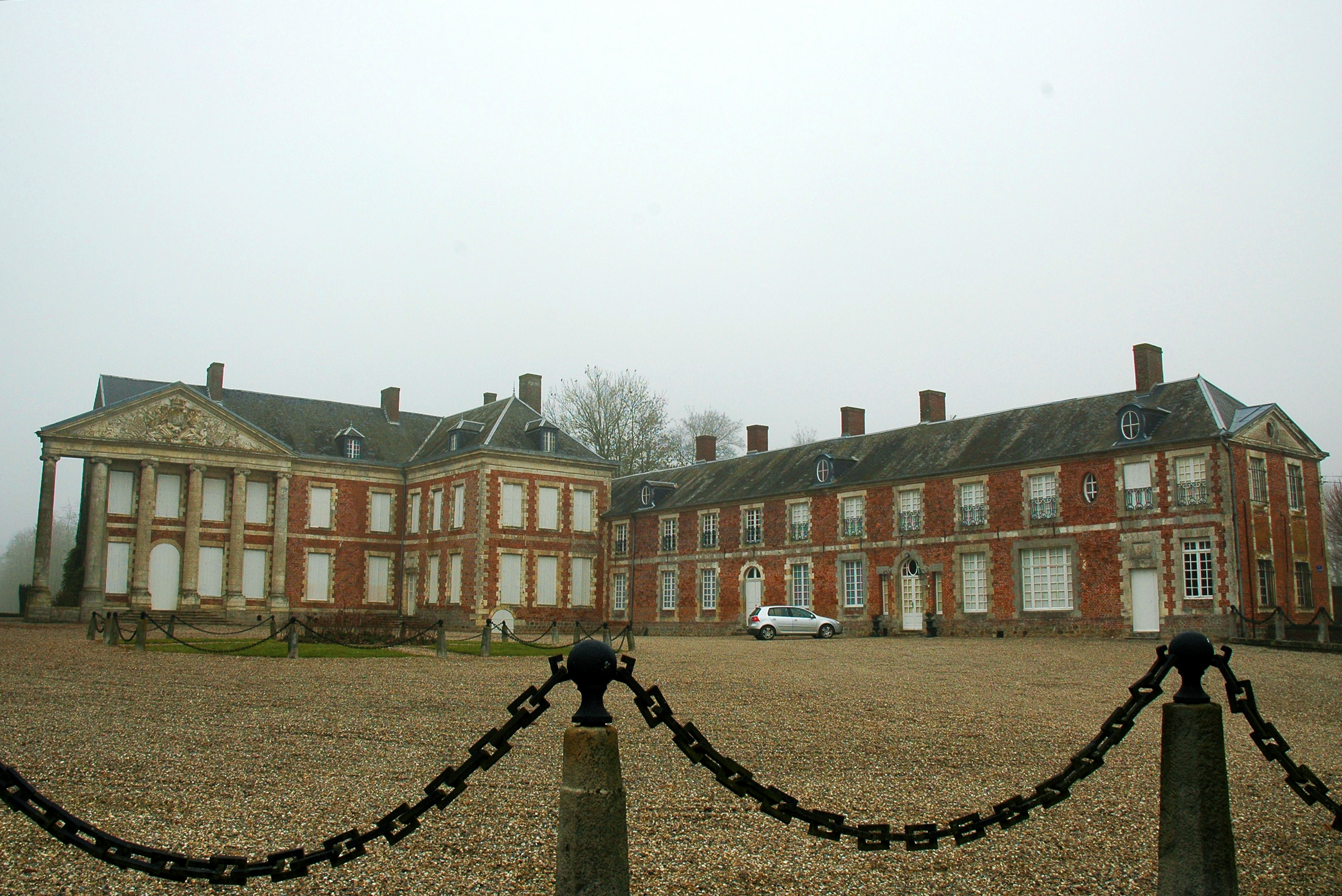 Hénencourt (Somme, France). Le château.